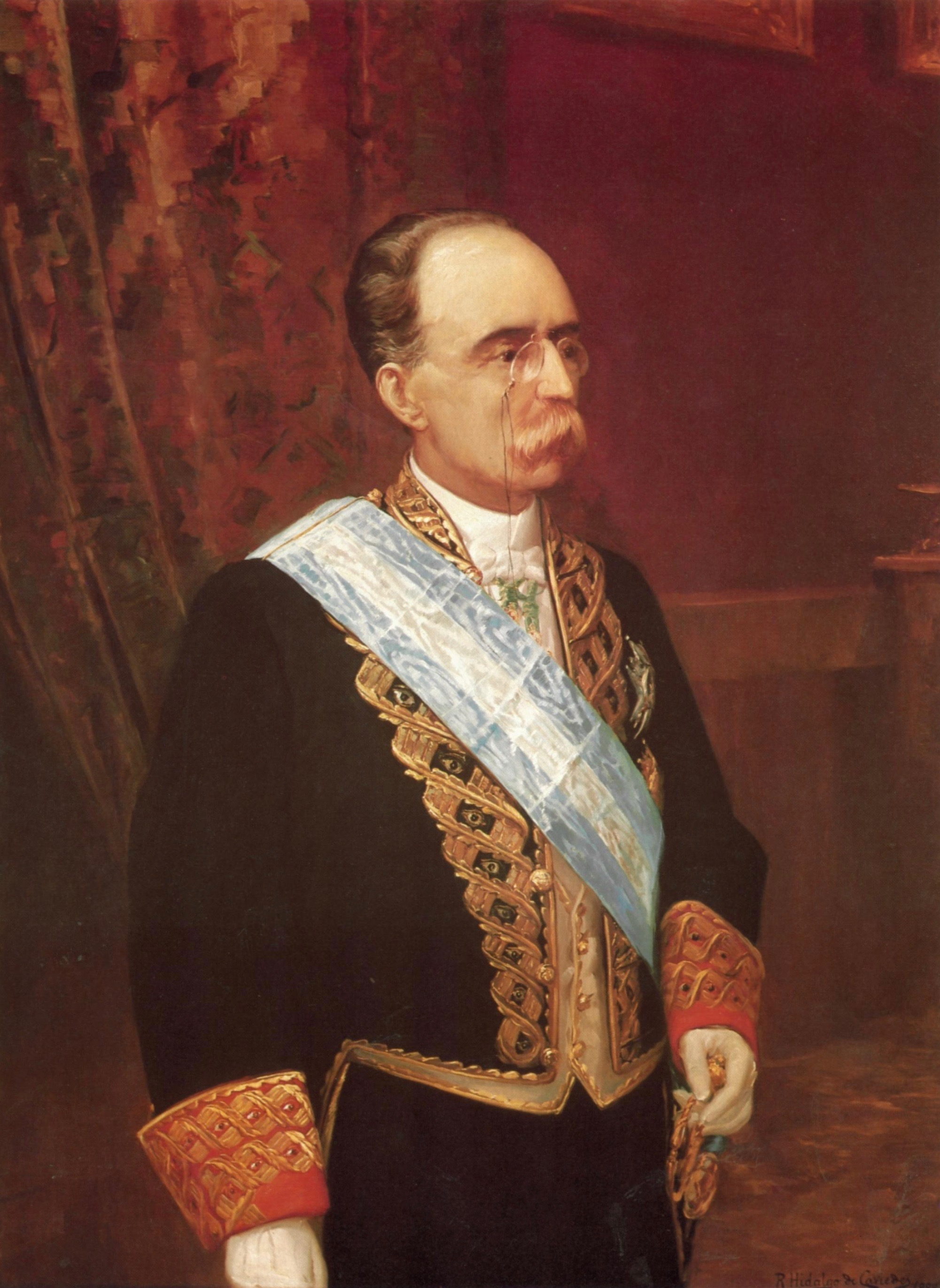 Antonio María Fabié